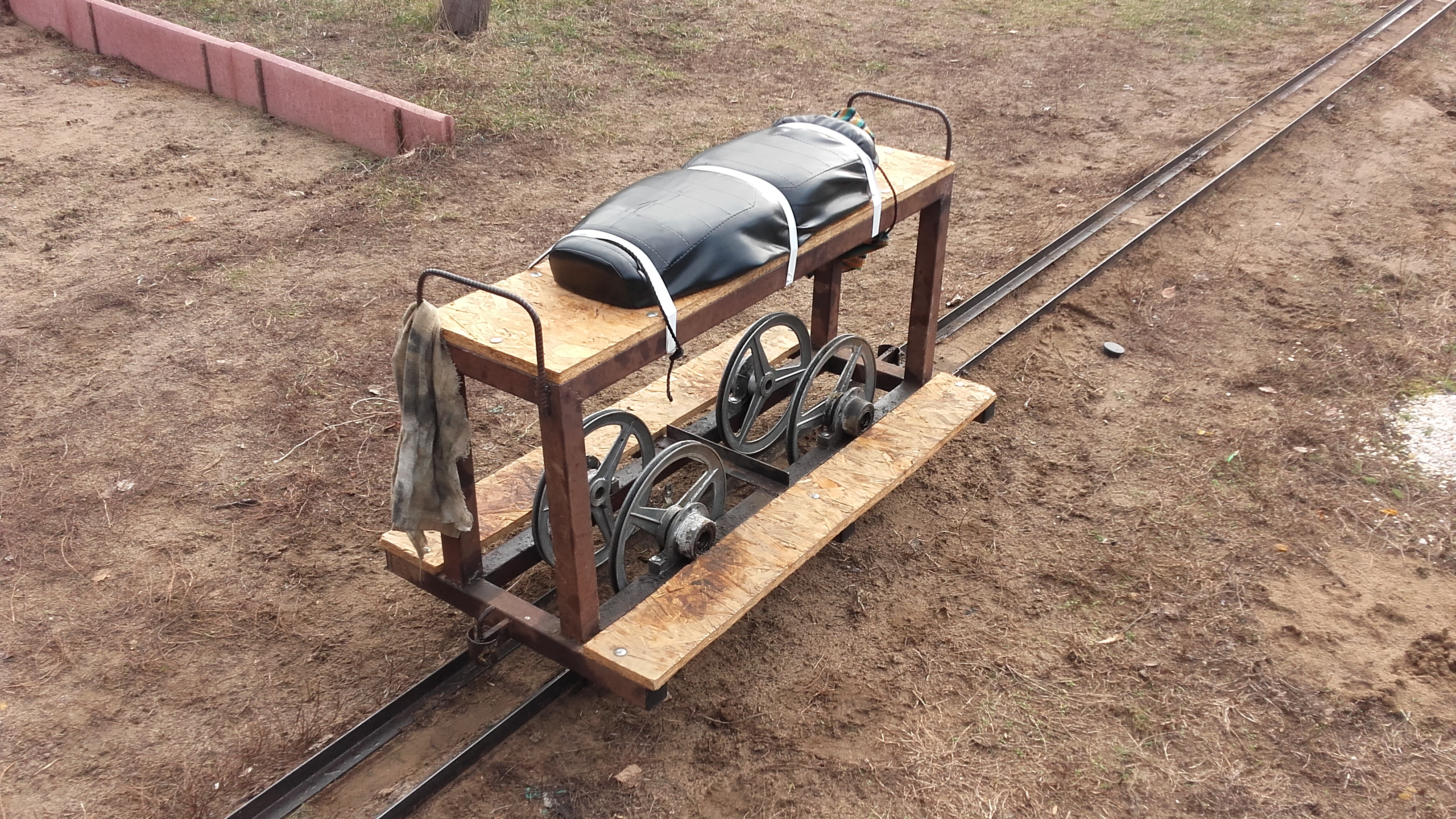 A GKV vasalvázas személyszállító kocsija